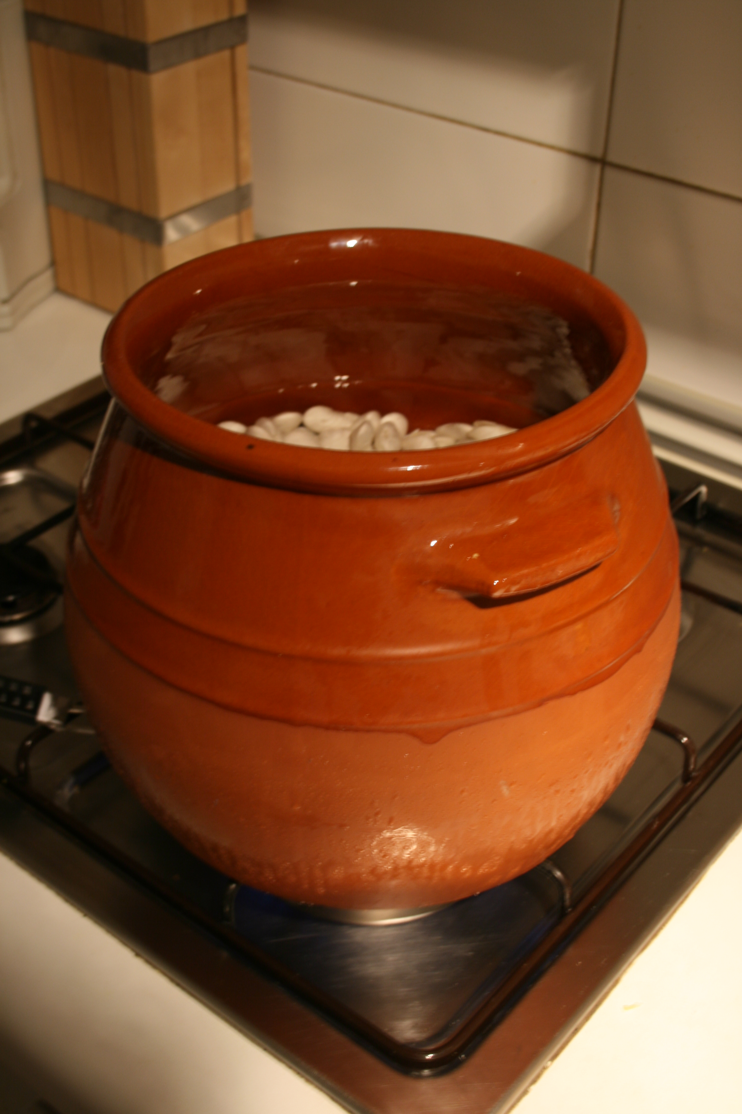 Olla de barro